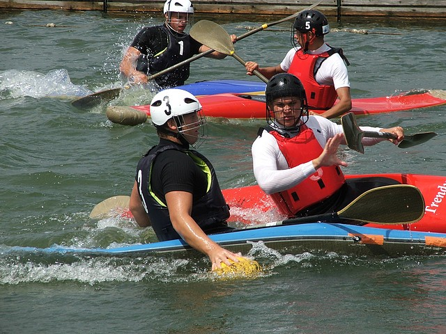 Fragment meczu w kajak-polo